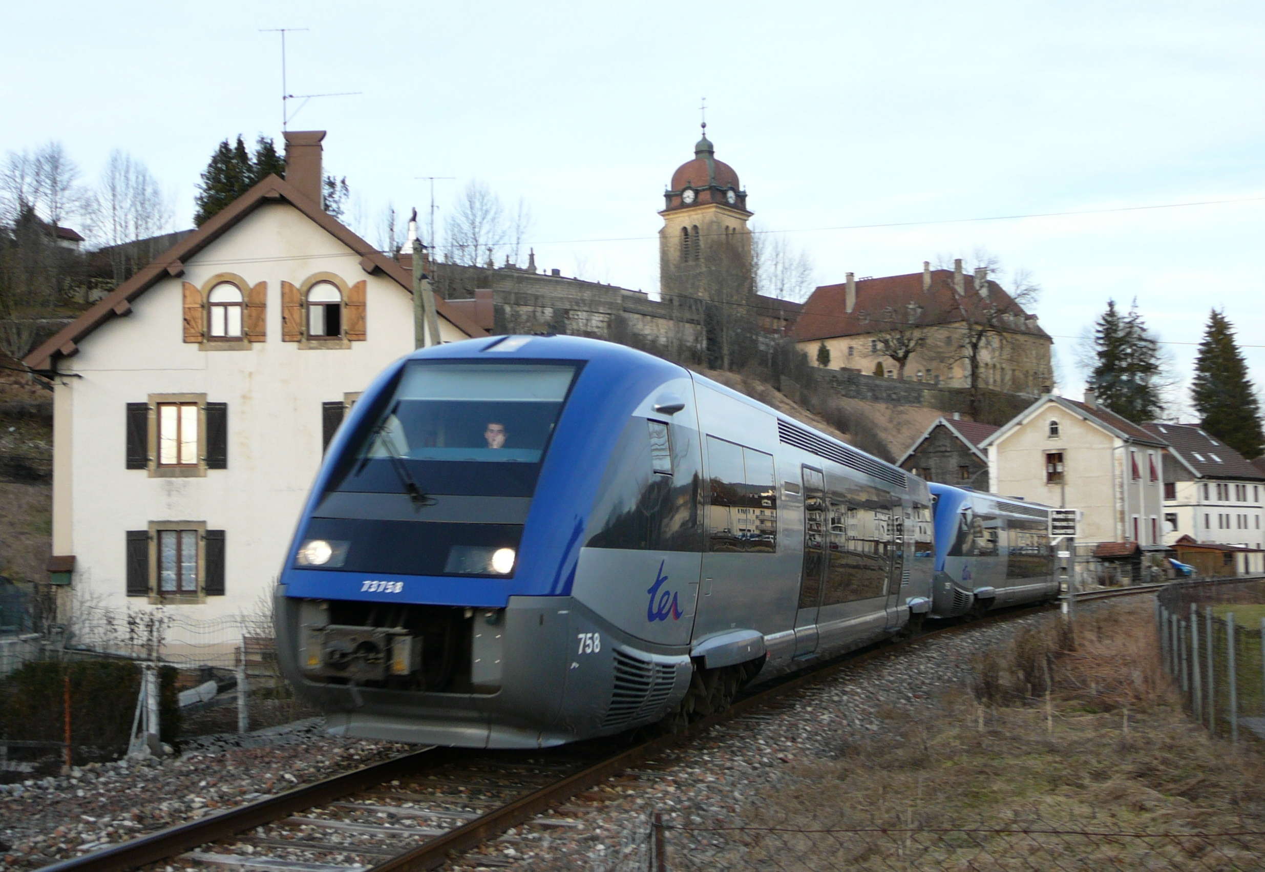 TER à Morteau